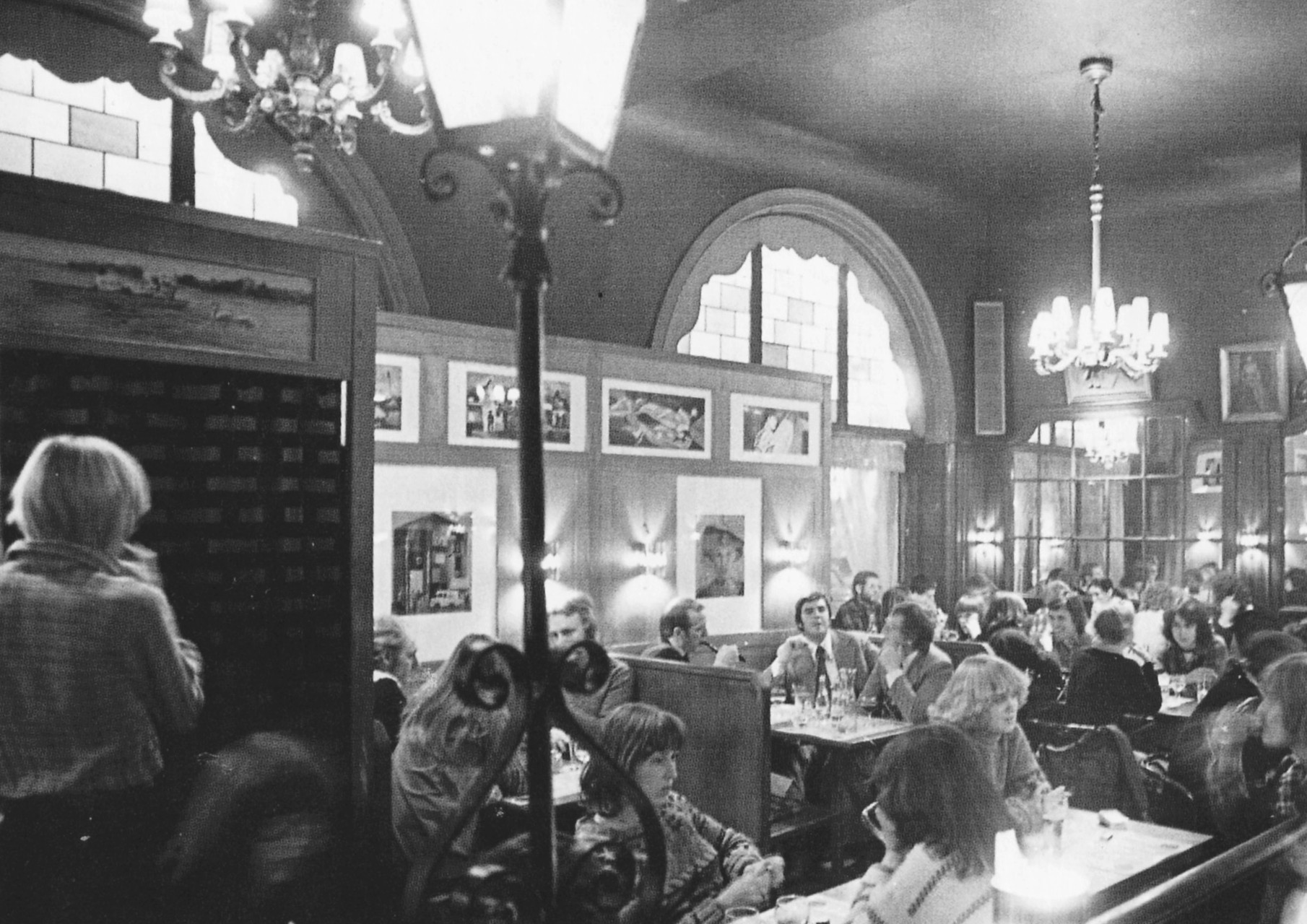 Restaurang Prinsen, Mäster Samuelsgatan 4, interiör